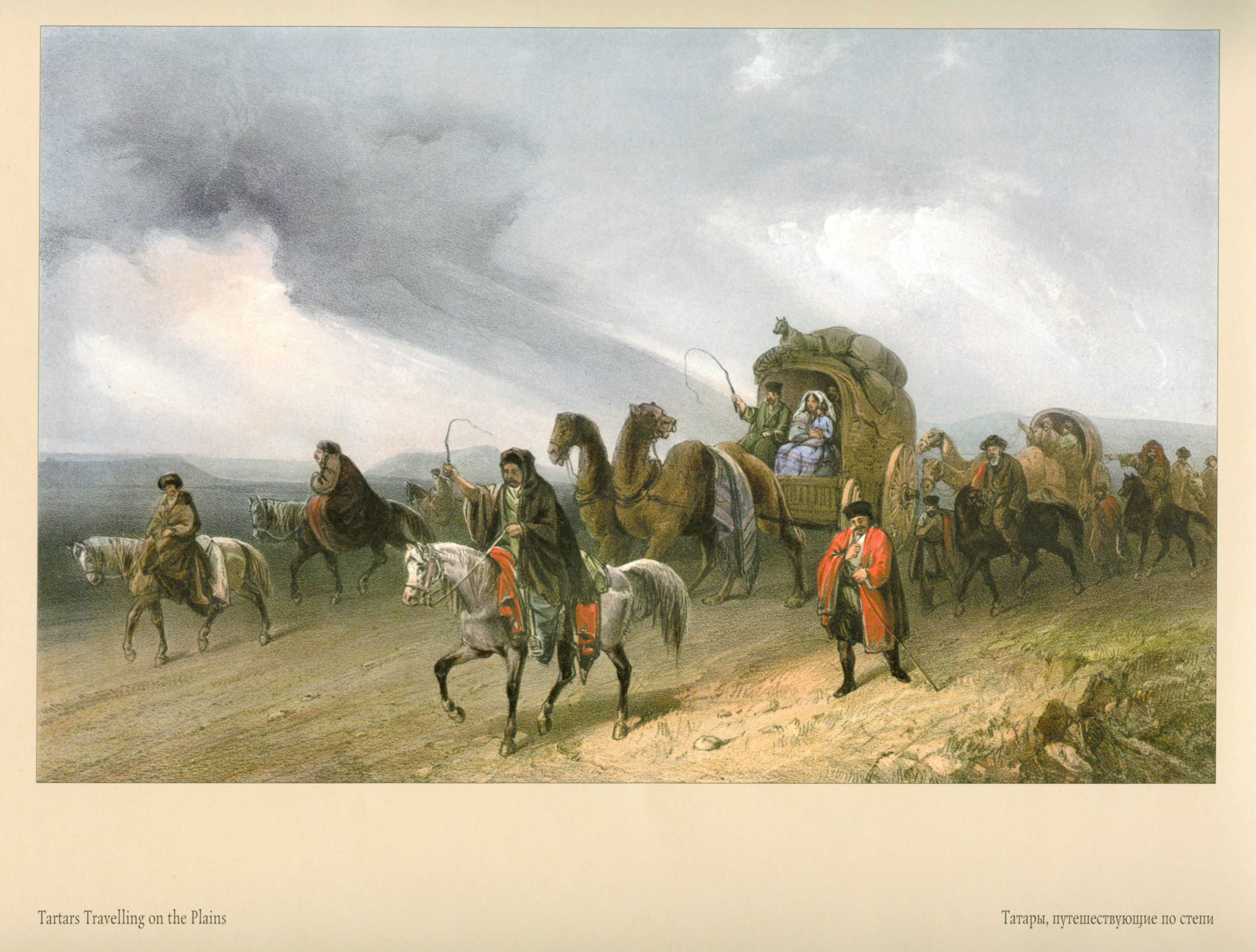 Карло Боссоли. Татары, путешествующие по степи